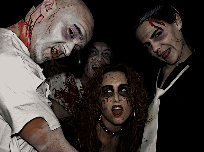 Halloween en Zaragoza